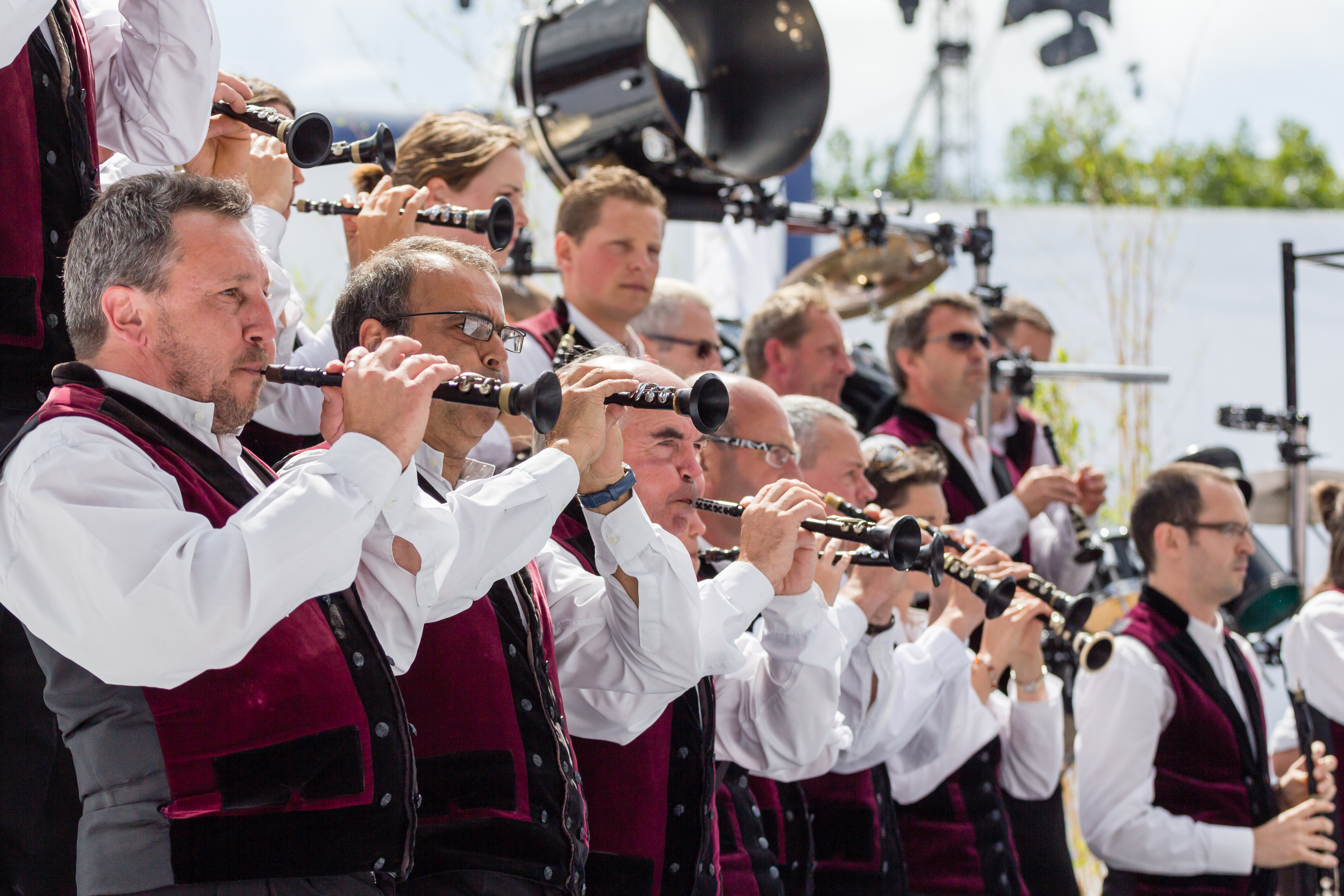 Le bagad Roñsed-Mor lors du championnat national des bagadoù (première catégorie) au FIL 2012.